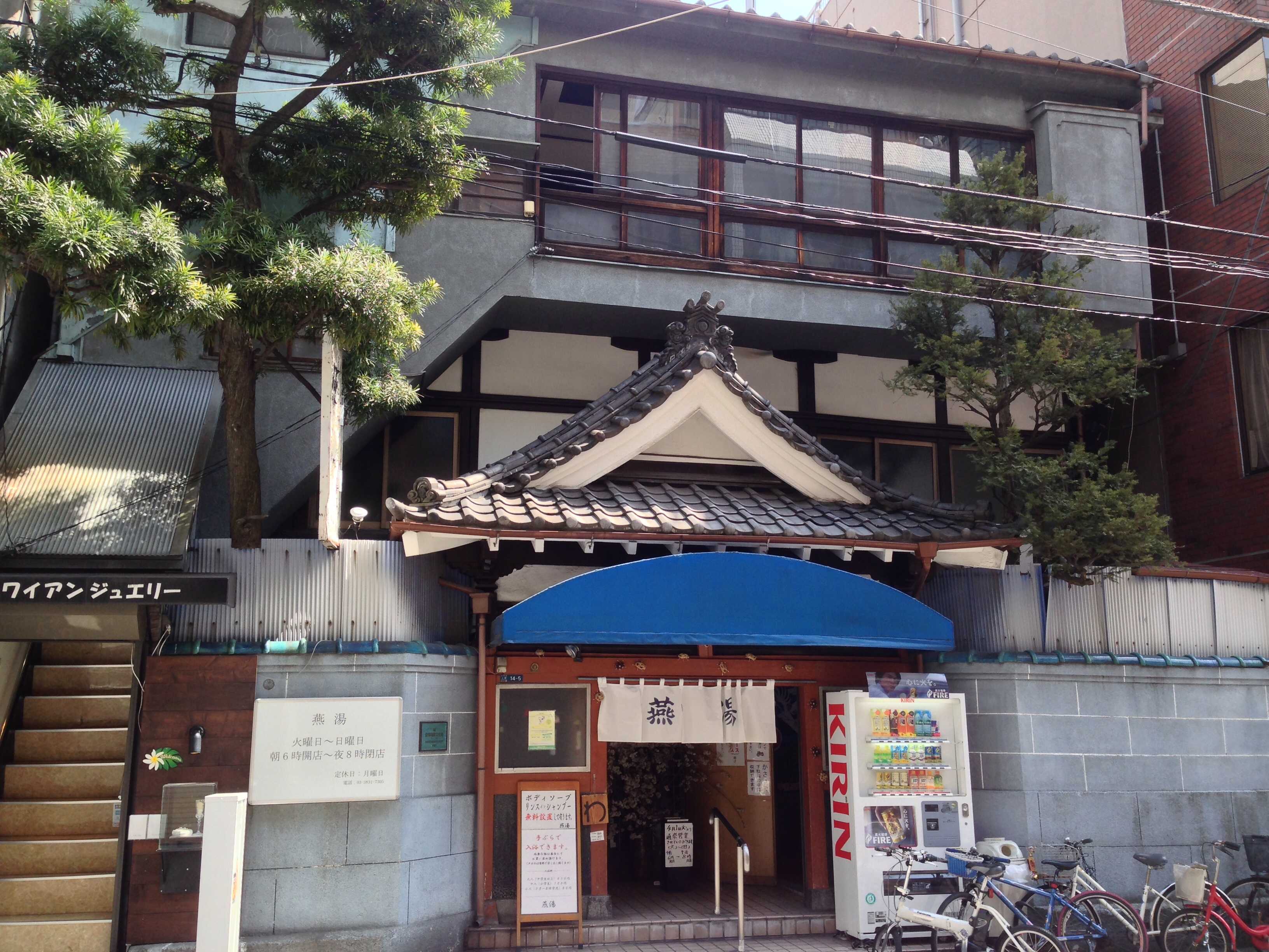 東京の上野にある有形文化財の銭湯「燕湯」の外観。